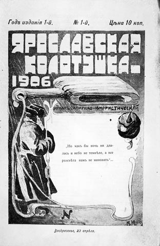 «Ярославская колотушка» — сатирический журнал, издававшийся в 1906—1908 годах в Ярославле. Самый первый номер - № 1 (23 апреля) за 1906 год.